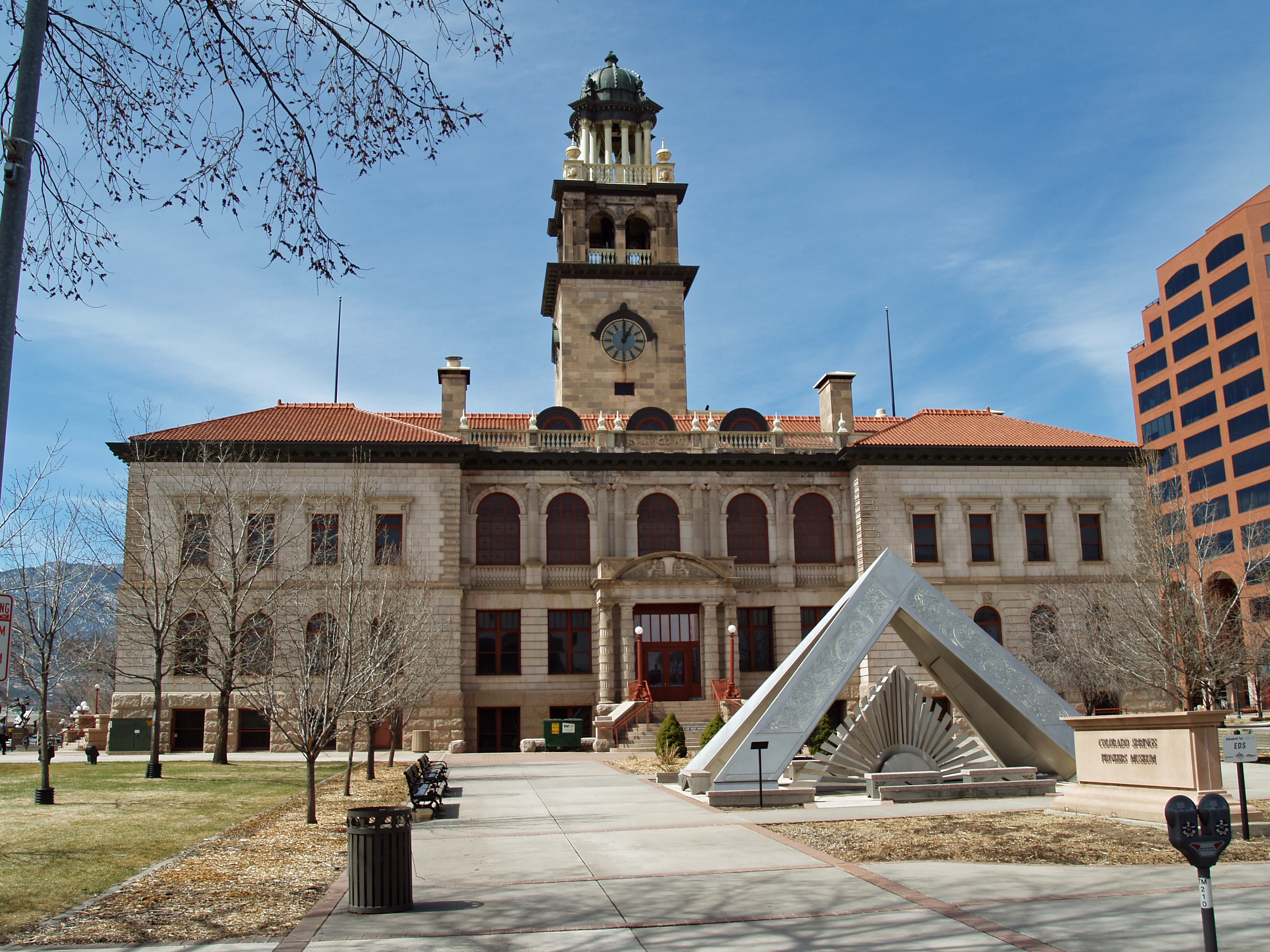 Colorado Springs, Colorado Pioneers Museum.